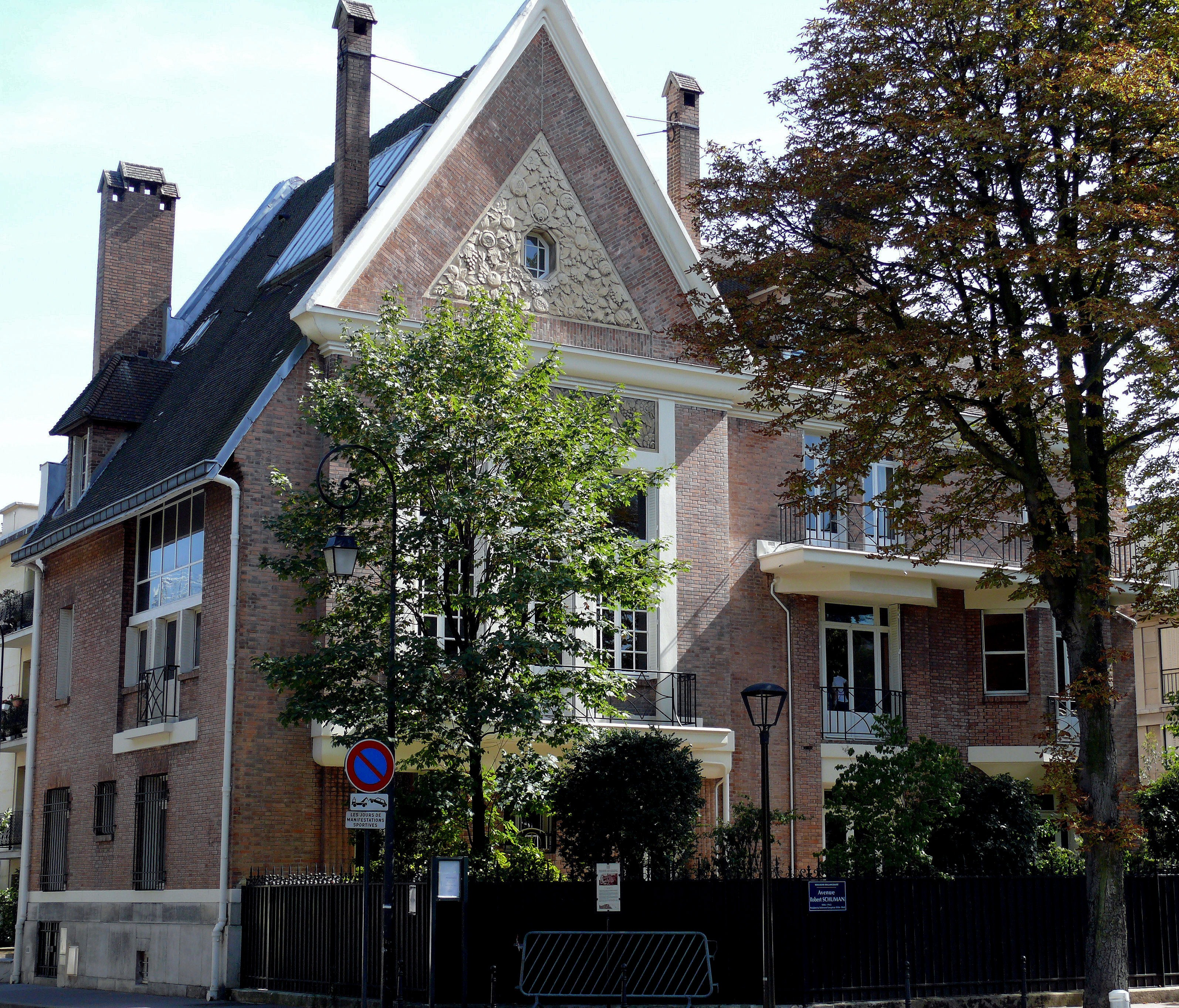 Boulogne-Billancourt - 19bis avenue Robert Schuman - Villa de Jean-Léon Courrèges